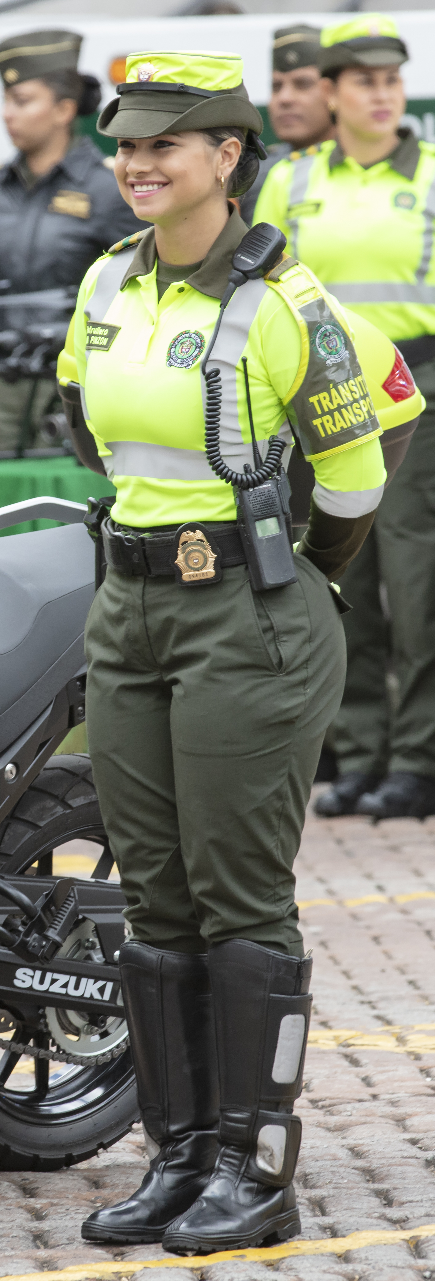 Policía colombiana motorizada.